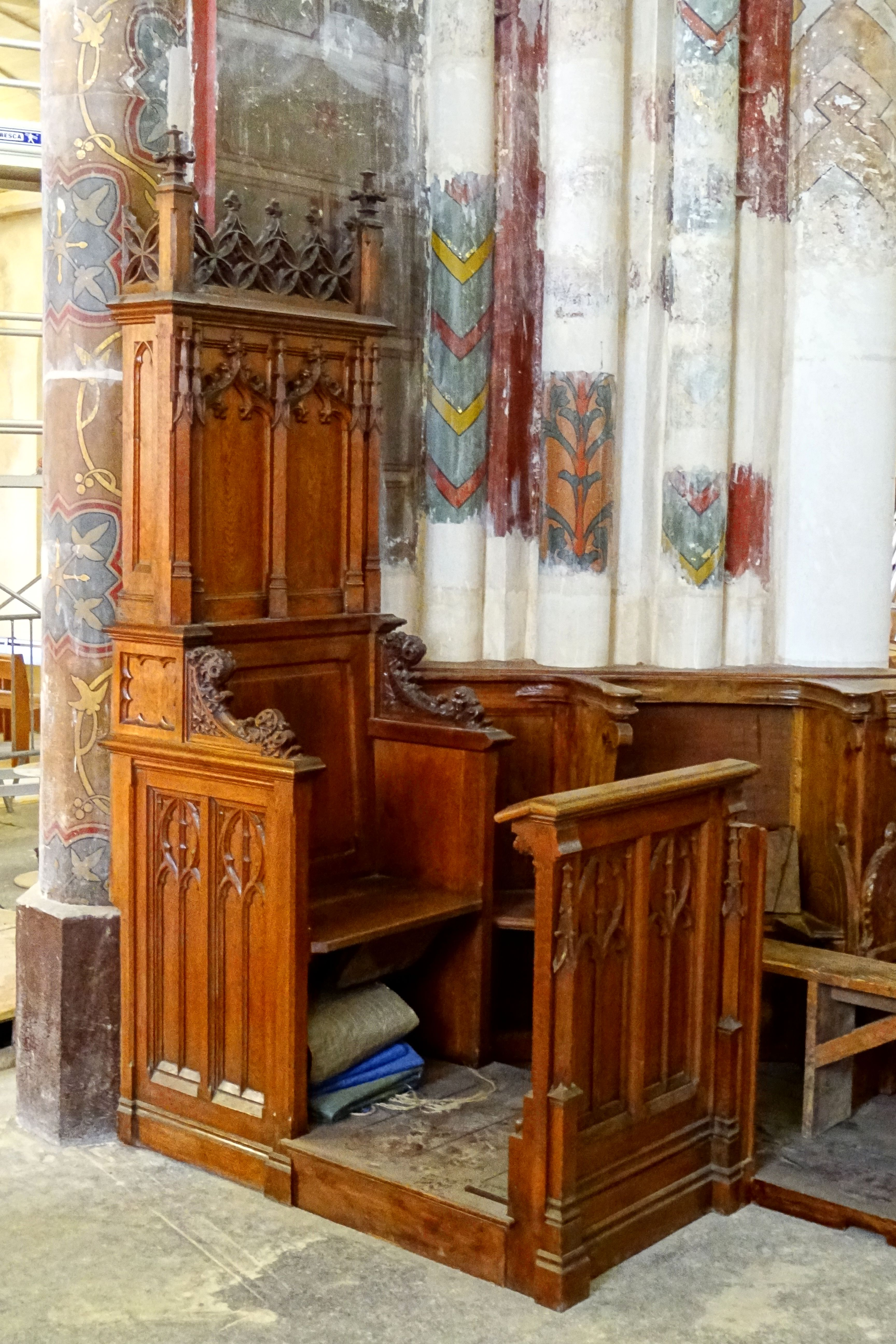 Chœur, 1ère travée, fauteuil de chantre côté nord, commandé probablement à la maison Moisseron et André d'Angers en 1881, avec son homologue du côté sud et les stalles néo-gothiques.